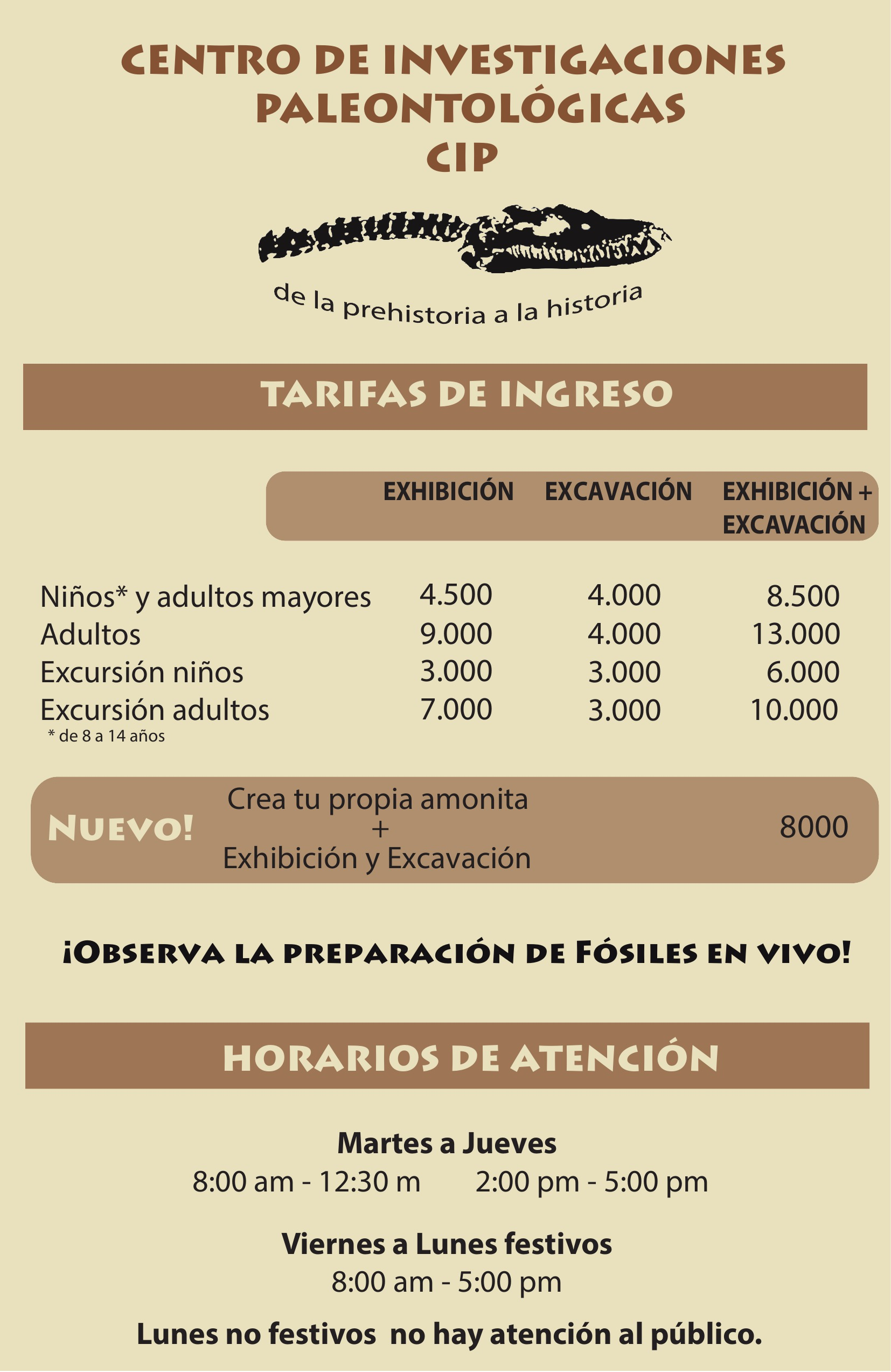 Tarifas 2015 del CIP.